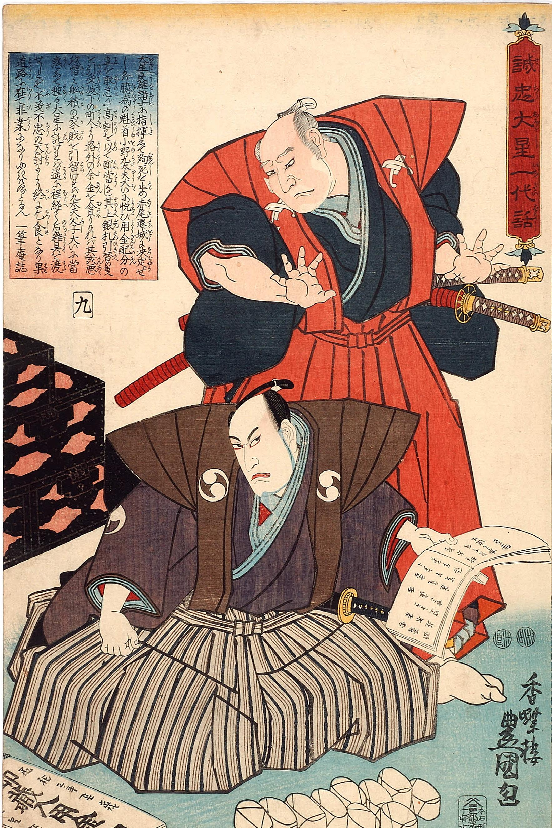 嘉永元年の泉岳寺の開帳にあわせてつくられたもの。